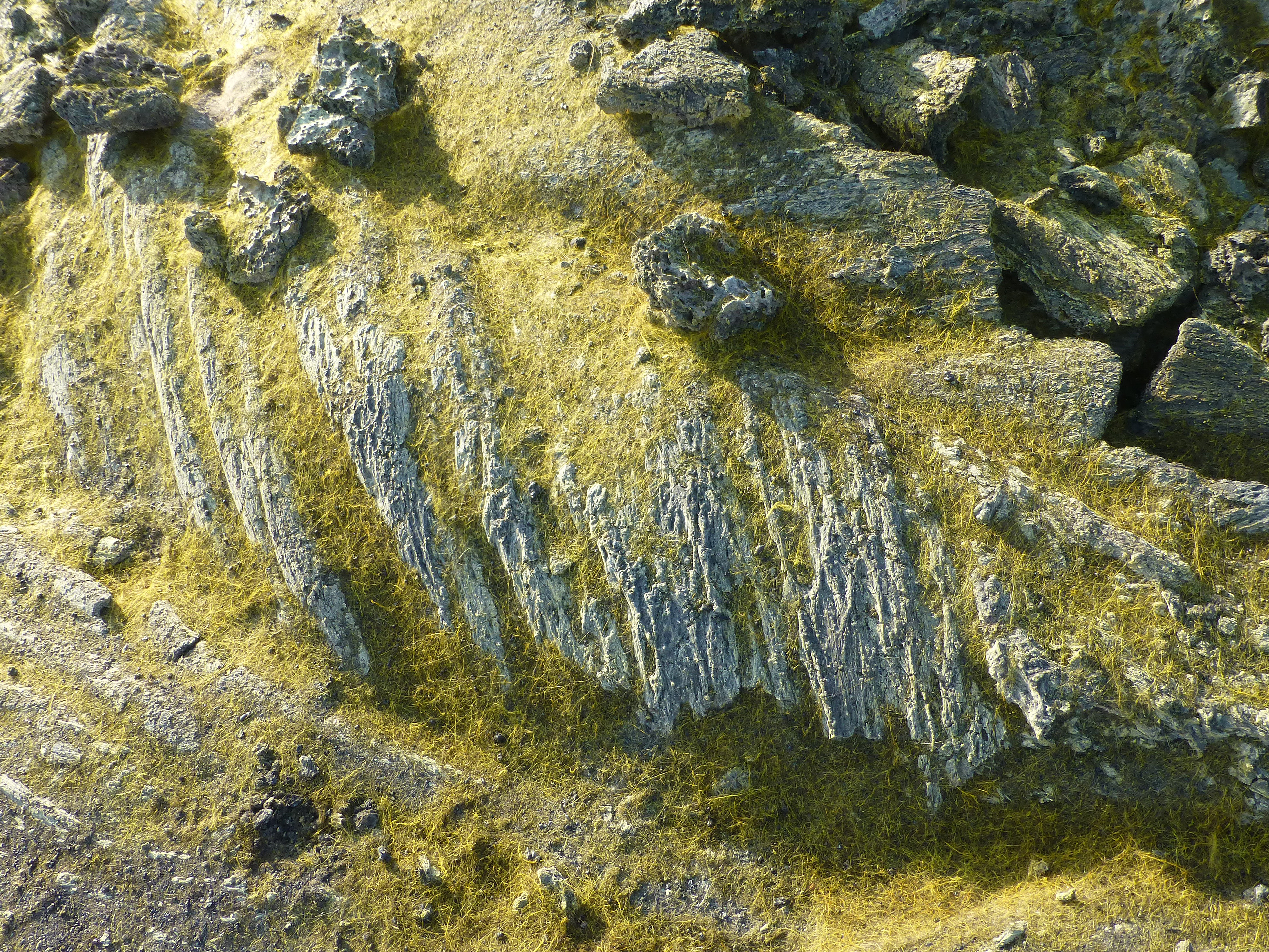 Ethiopie, Région Afar, Danakil : cheveux de Pélé sur le volcan Erta Ale